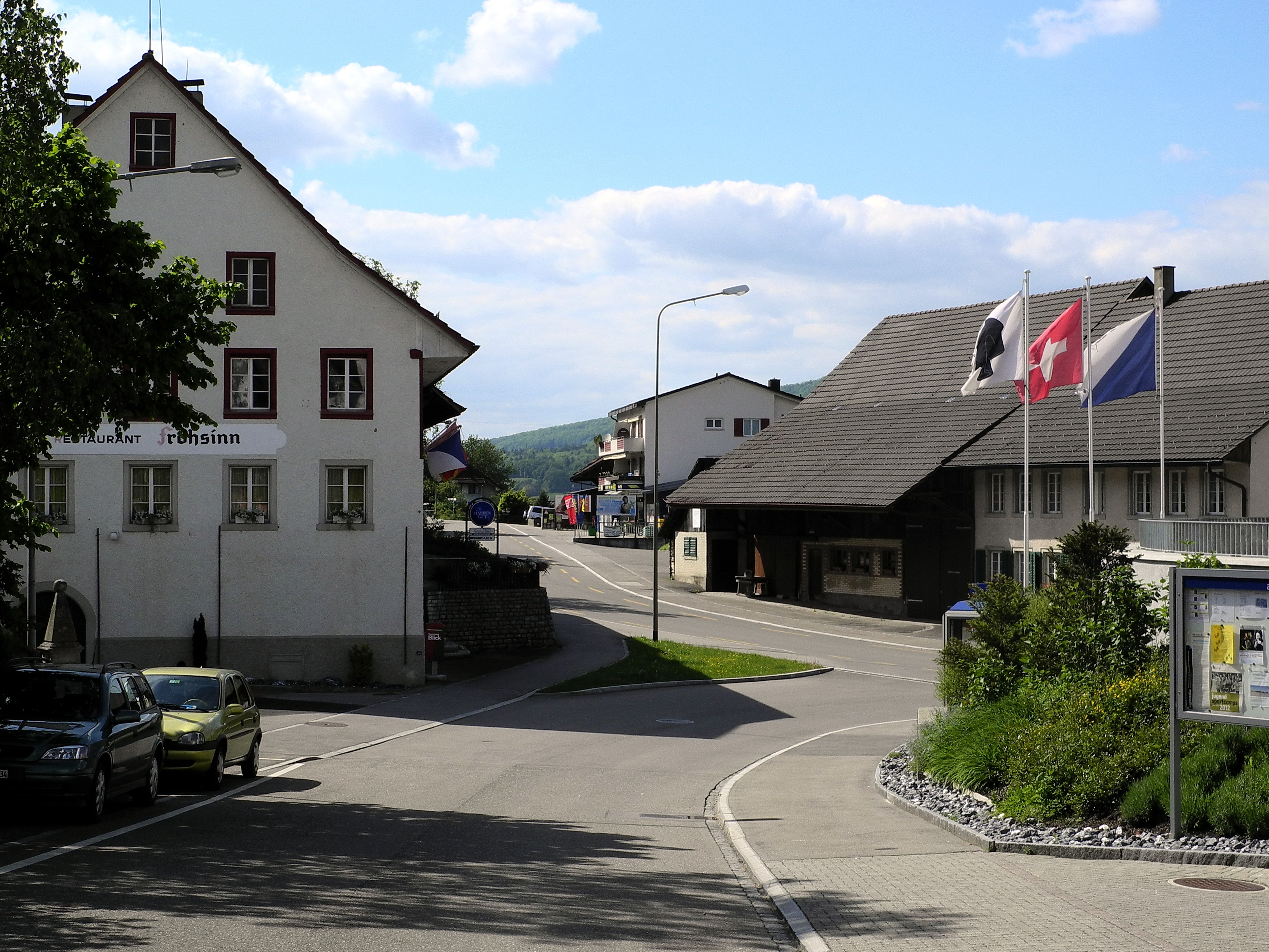 Hauptstrasse, Oberdorfstrasse, Dänikon (Switzerland)